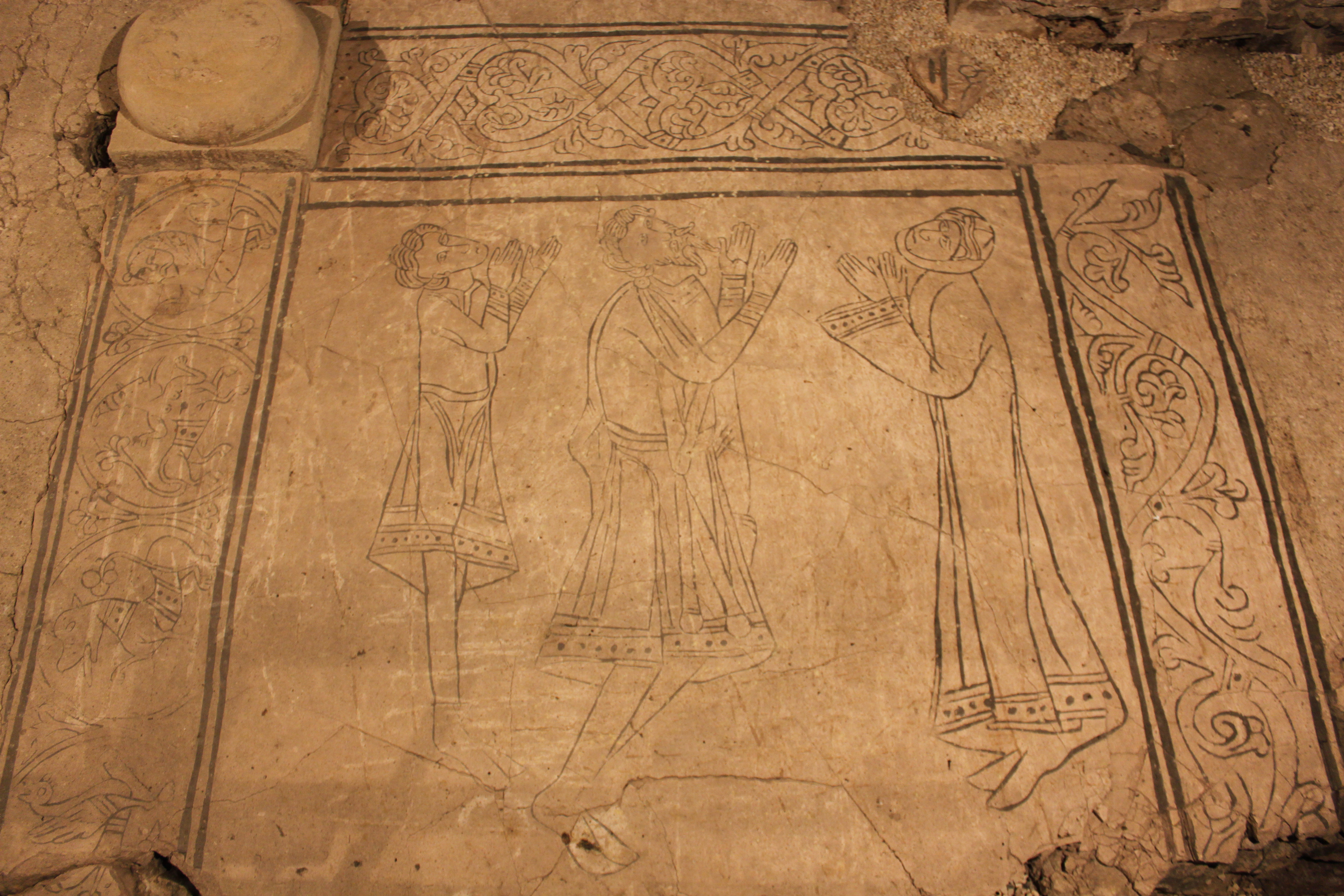 Wiślica, kościół par. pw. Narodzenia NMP, lata 1350-1380, poł. XVII w., lata 1919-1926